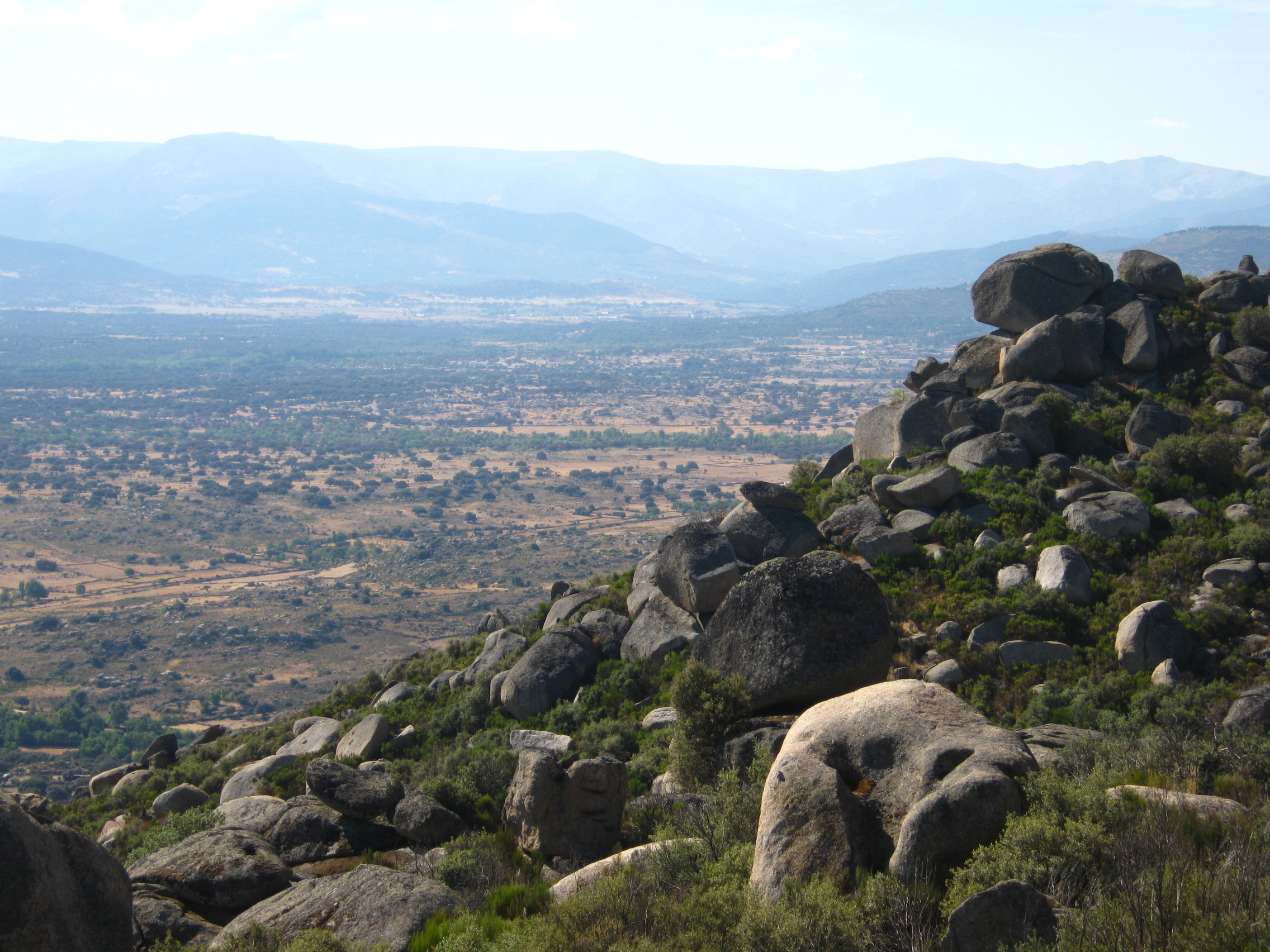 Vista panorámica desde el Cerro del Berrueco (El Tejado, Salamanca)